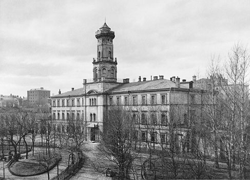 199. Сущевскiй полицейскiй домъ на Селезневской ул. (Москва)